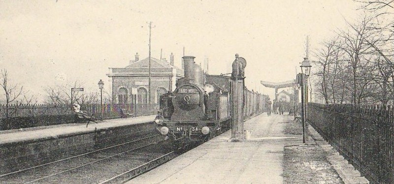 Gare d'Orléans-Ceinture (Paris 13e) - Petite Ceinture